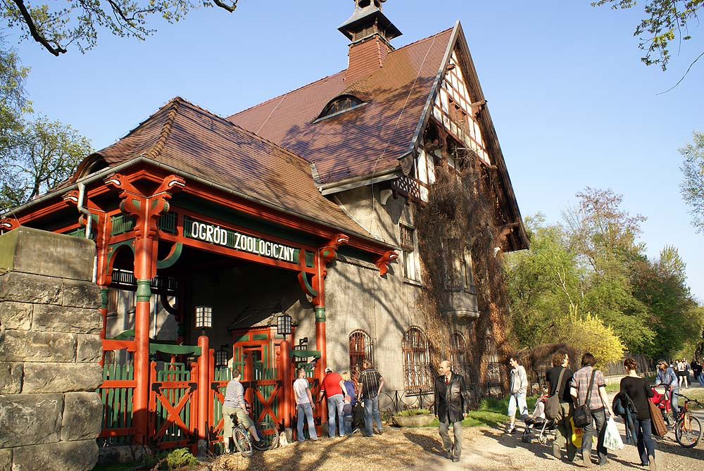 Wrocław Śródmieście, ul. Wróblewskiego 1 - Ogród Zoologiczny: wejście od Odry (zabytek nr A/5263/361/Wm)